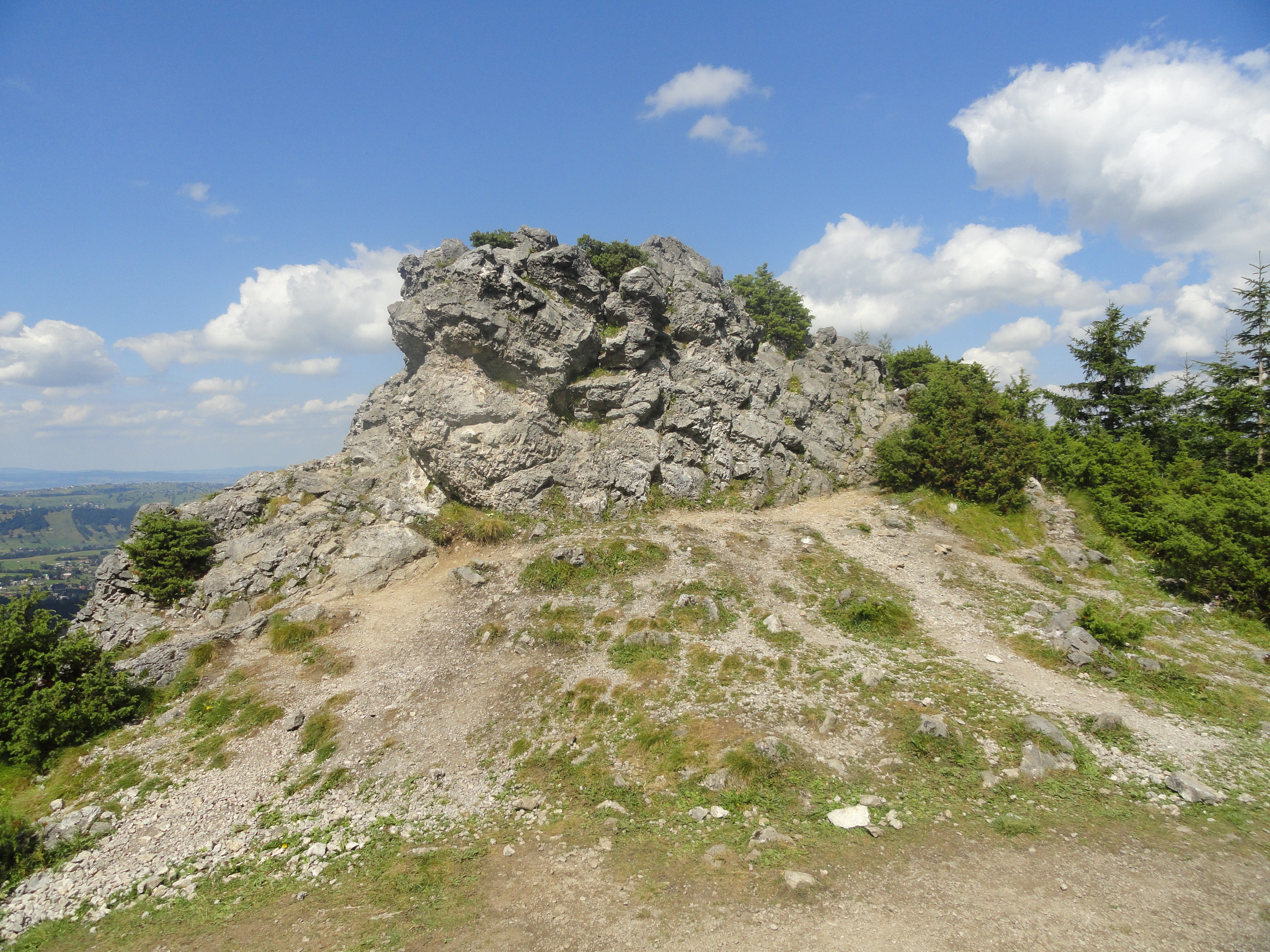 Skała w rejonie szczytu Wielkiego Kopieńca. This is a photography of protected area with CRFOP ID PL.ZIPOP.1393.PN.14